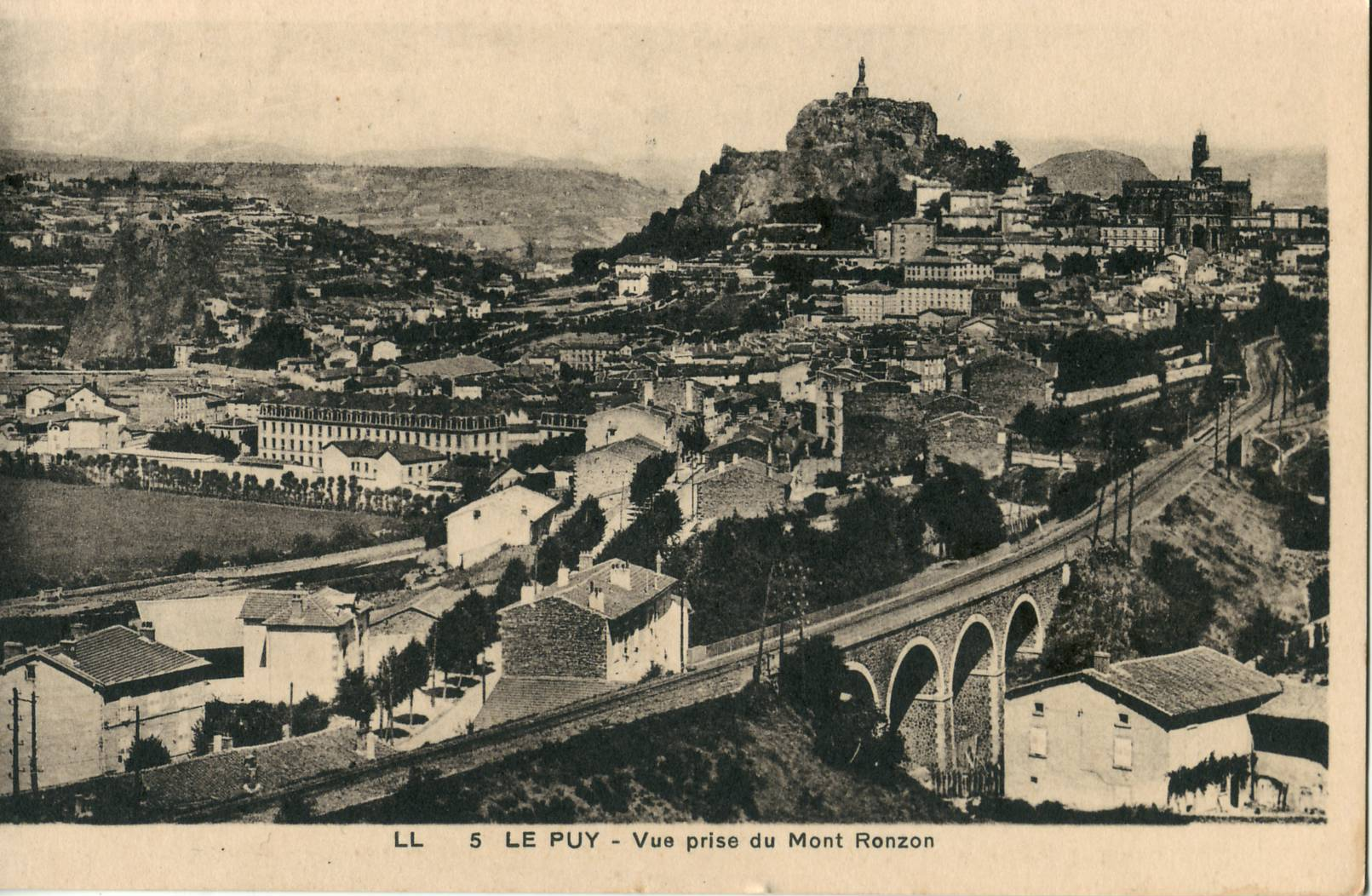 Carte postale ancienne éditée par